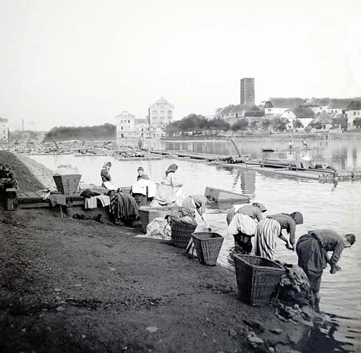 Praní prádla / Washing laundry